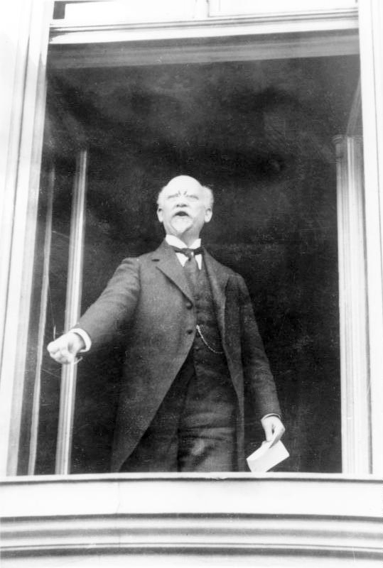 Scheidemann verkündet vom Fenster des Deutschen Reichstages die deutsche Republik.